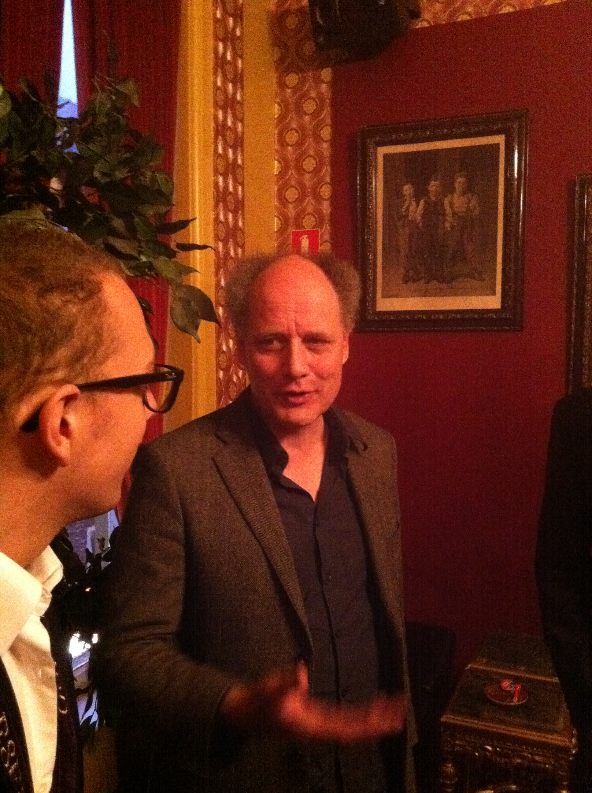 P.F. Thomése vlak na zijn lezing, gehouden voor de Gereformeerde StudentenVereniging in Café Huis de Beurs te Groningen.